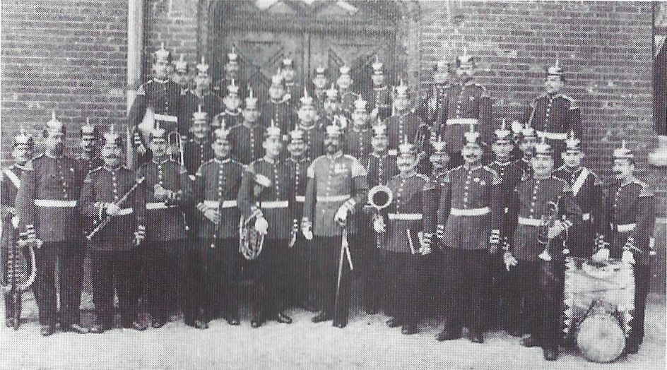 Musikkorps des 1. (Ostpreußischen) Grenadier-Regiments Nr. 1 „Kronprinz“, in der Mitte Gustav Sabac el Cher, rechts neben ihm (mit Partitur) Konzertmeister August Maschitzki, ganz links in der 1. Reihe der spätere Musikmeister Hermann Gareis.